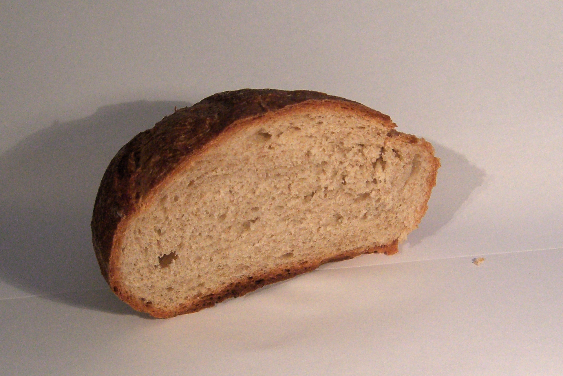 Ruchbrot